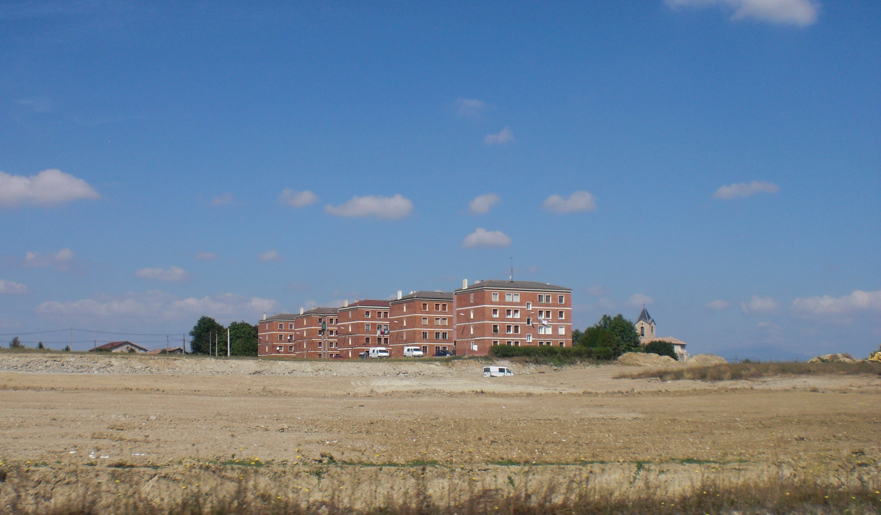 Gasteizko Aretxabaletako langileen etxeak